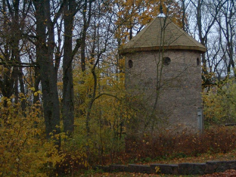 Noriūnų dvaro rūkykla (dolomitinis bokštas)